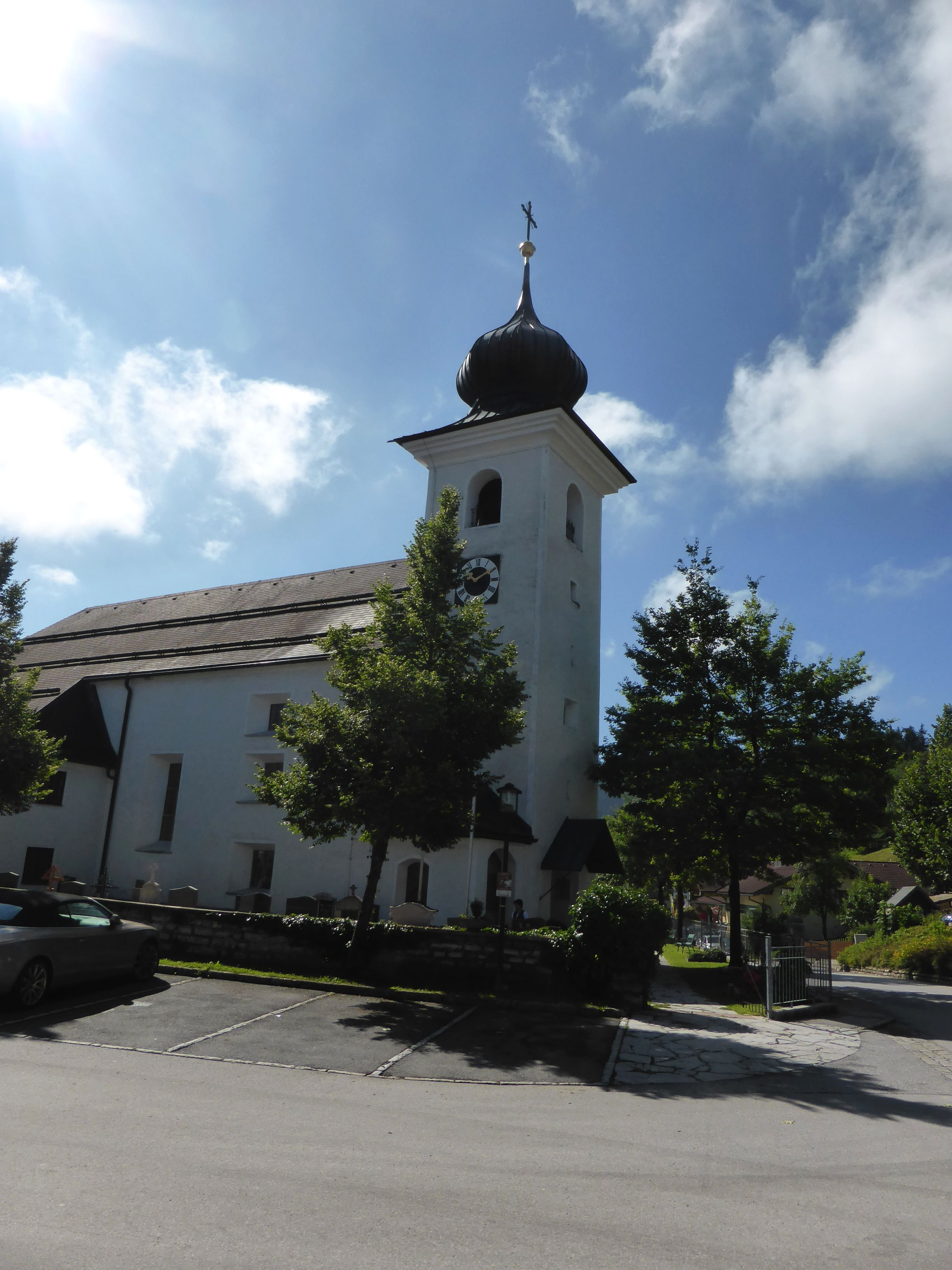 Kath. Pfarrkirche hl. Koloman